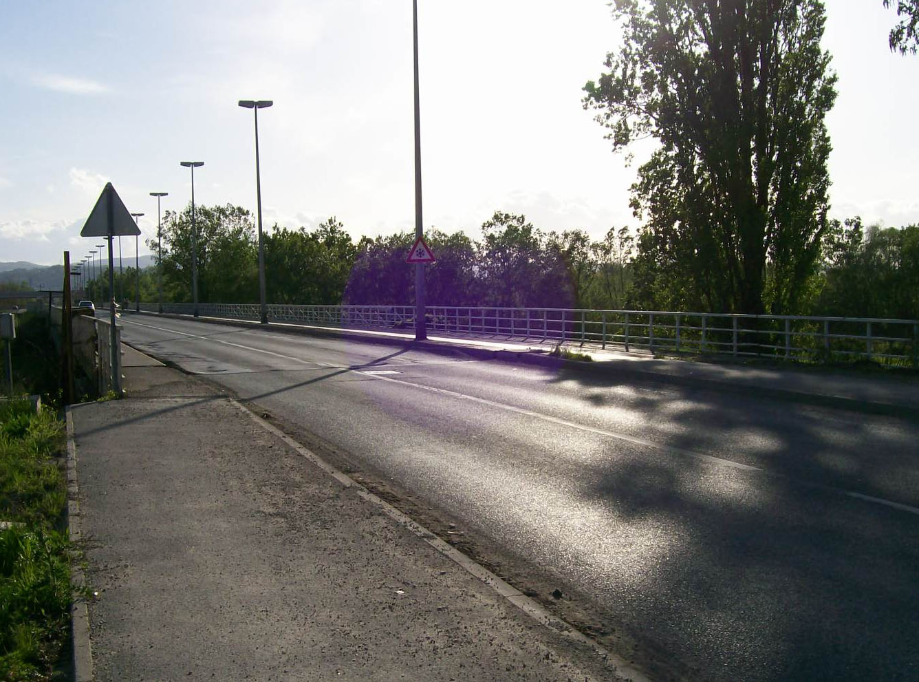 Podsusedski most Zagreb